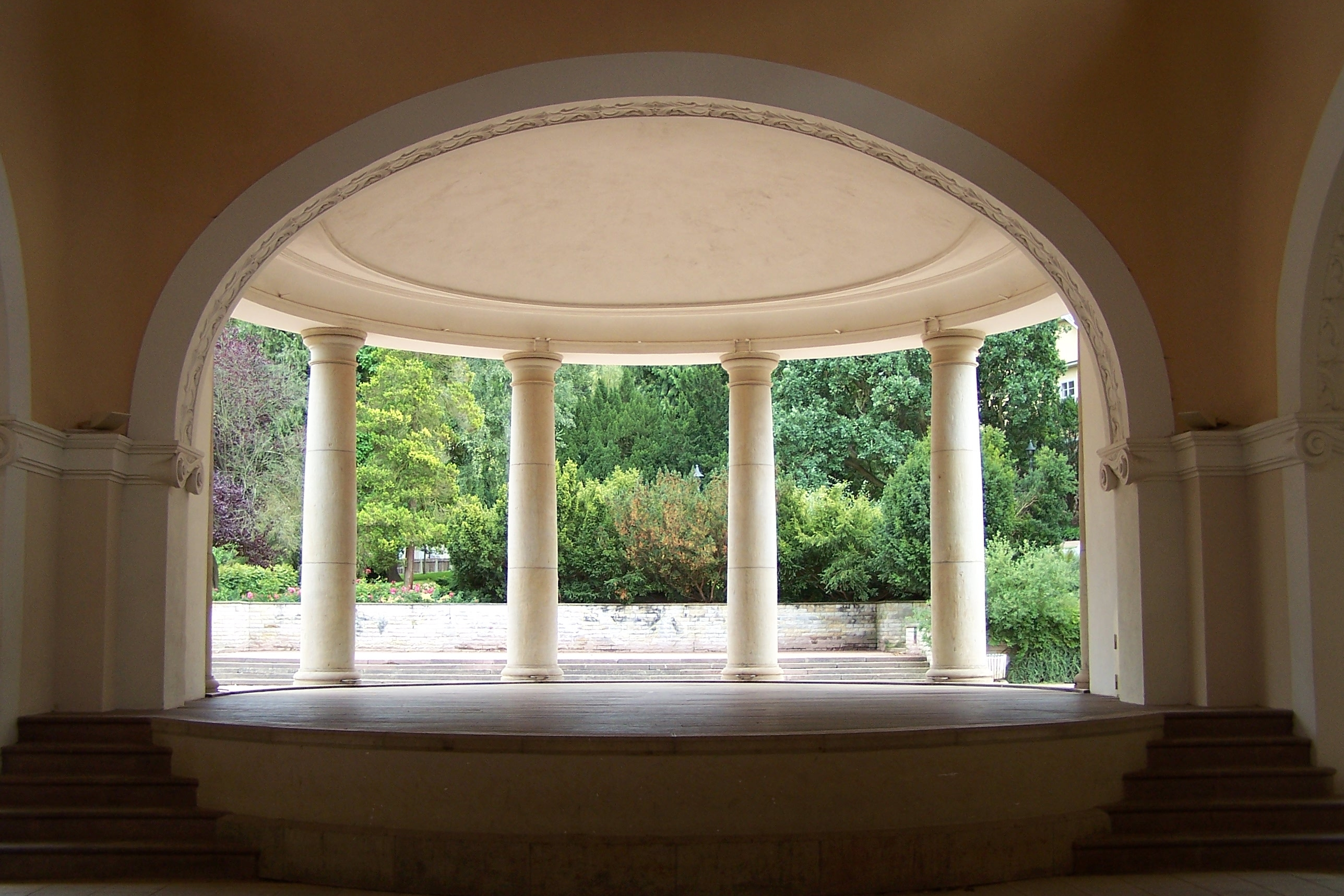 Die Bühne - Innenansicht - Blick Richtung Osten zum Park.